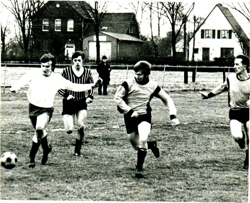 Tus Alteheide / Spiel